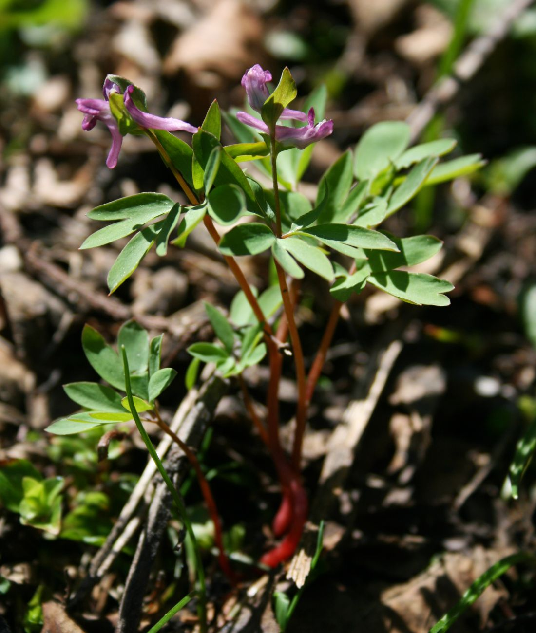 Mittlerer Lerchensporn (Corydalis intermedia), Mohngewächse (Papaveraceae), Erdrauchgewächse (Fumarioideae) - Österreich/Austria/Autriche: Steiermark, Ennstaler Alpen, Admonter Höhe SW St. Gallen, ca. 1300 m